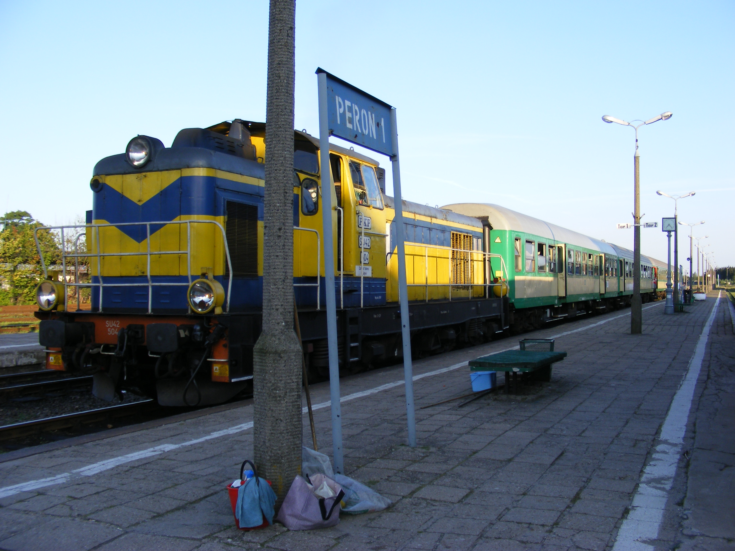 Stacja kolejowa w Kościerzynie - peron 1.